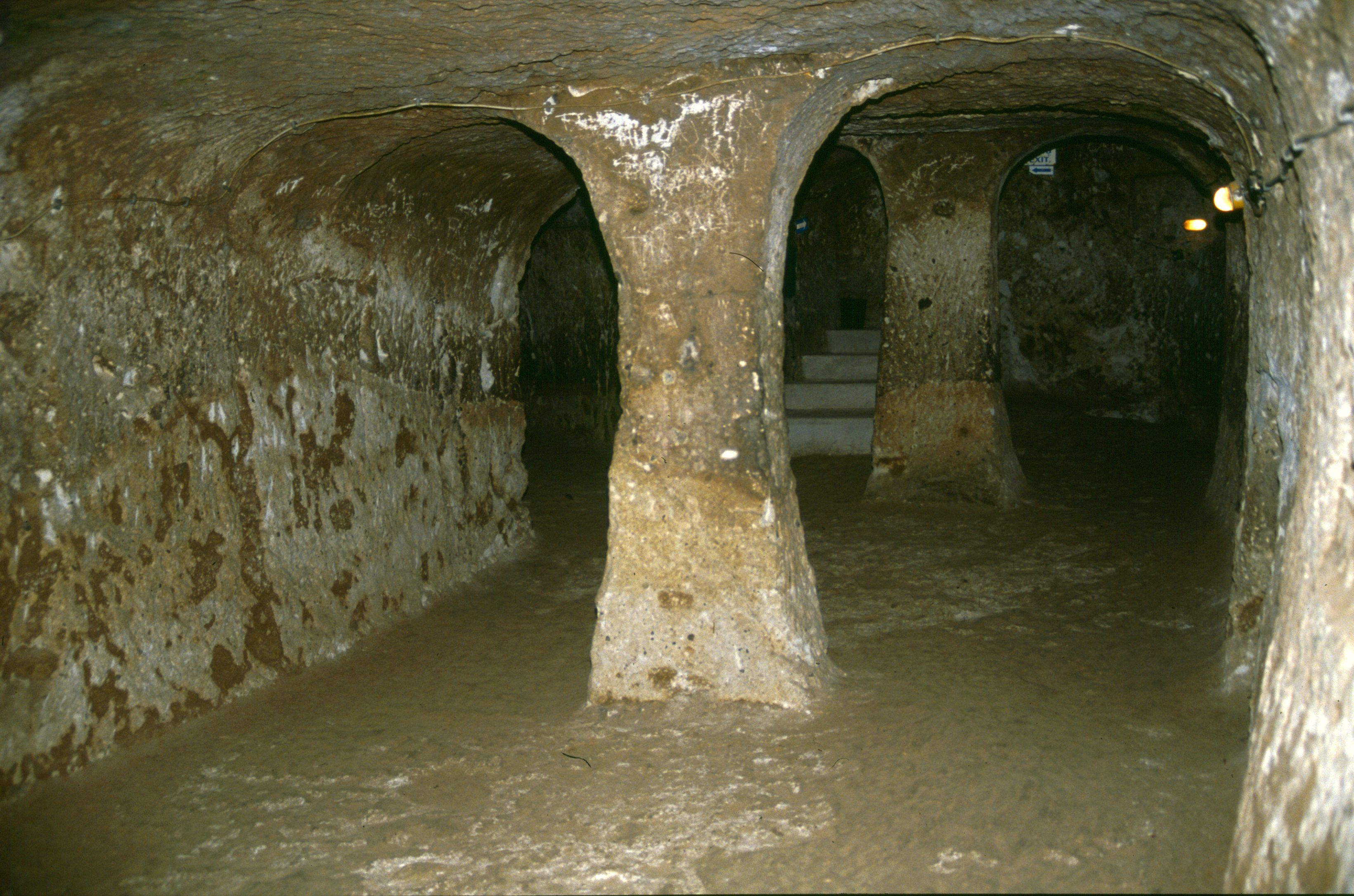 Derinkuyu: Unterirdische Stadt